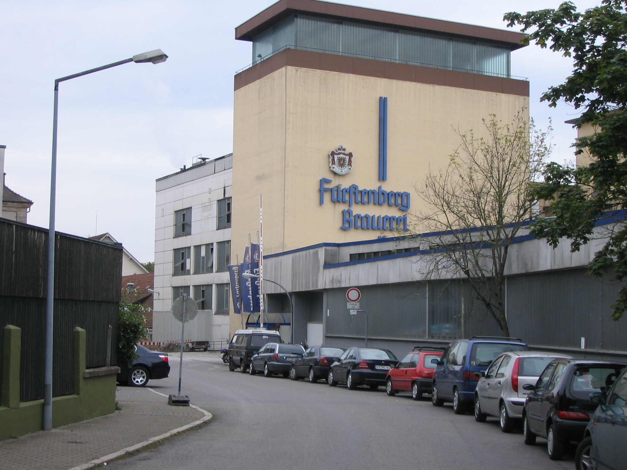 Werkseingang der Brauerei Fürstenberg in Donaueschingen